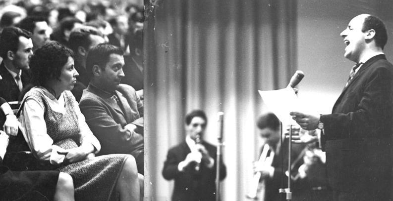 Zentralbild-Kohls Ge-Pr 27.3.1963 Ausverkauft... war der Jazzabend mit Manfred Krug und den Jazzoptimisten Berlin am 26.3.1963 im Auditorium Maximum in der Berliner Humboldt-Universität.